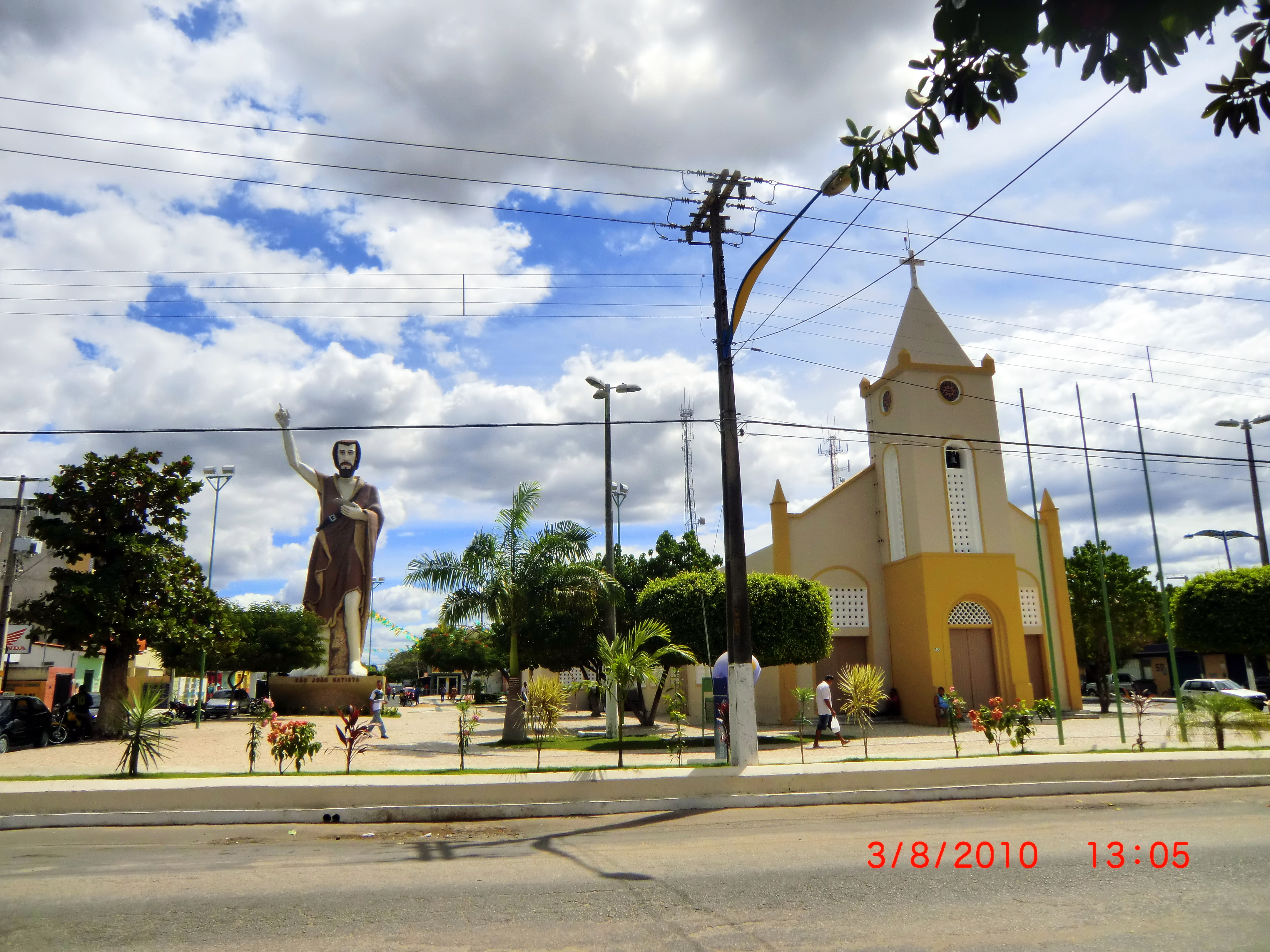 Igreja-Matriz Paróquia São João Batista - Horizonte - CE